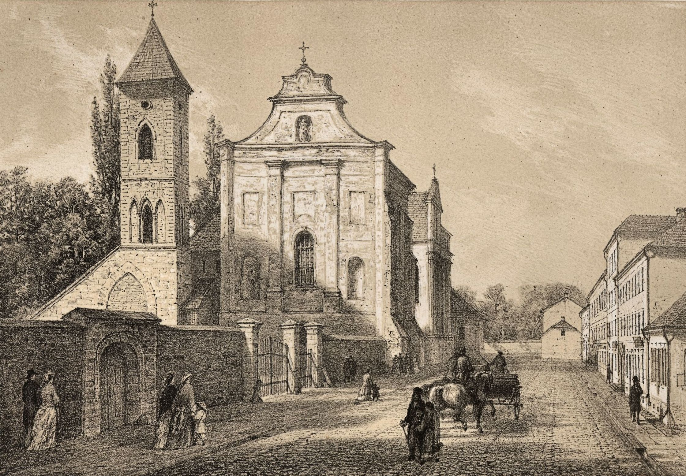 Oryginalny opis: "Gniezno (Księstwo Poznańskie). Kościół XX. Franciszkanów założony przez Bolesława Pobożnego księcia Kaliskiego r. 1279. W bocznym ołtarzu spoczywają zwłoki błogosławionej Jolanty żony założyciela. Obecny kościół wybudowany po pożarze r. 1613." Obok podobny opis w języku francuskim